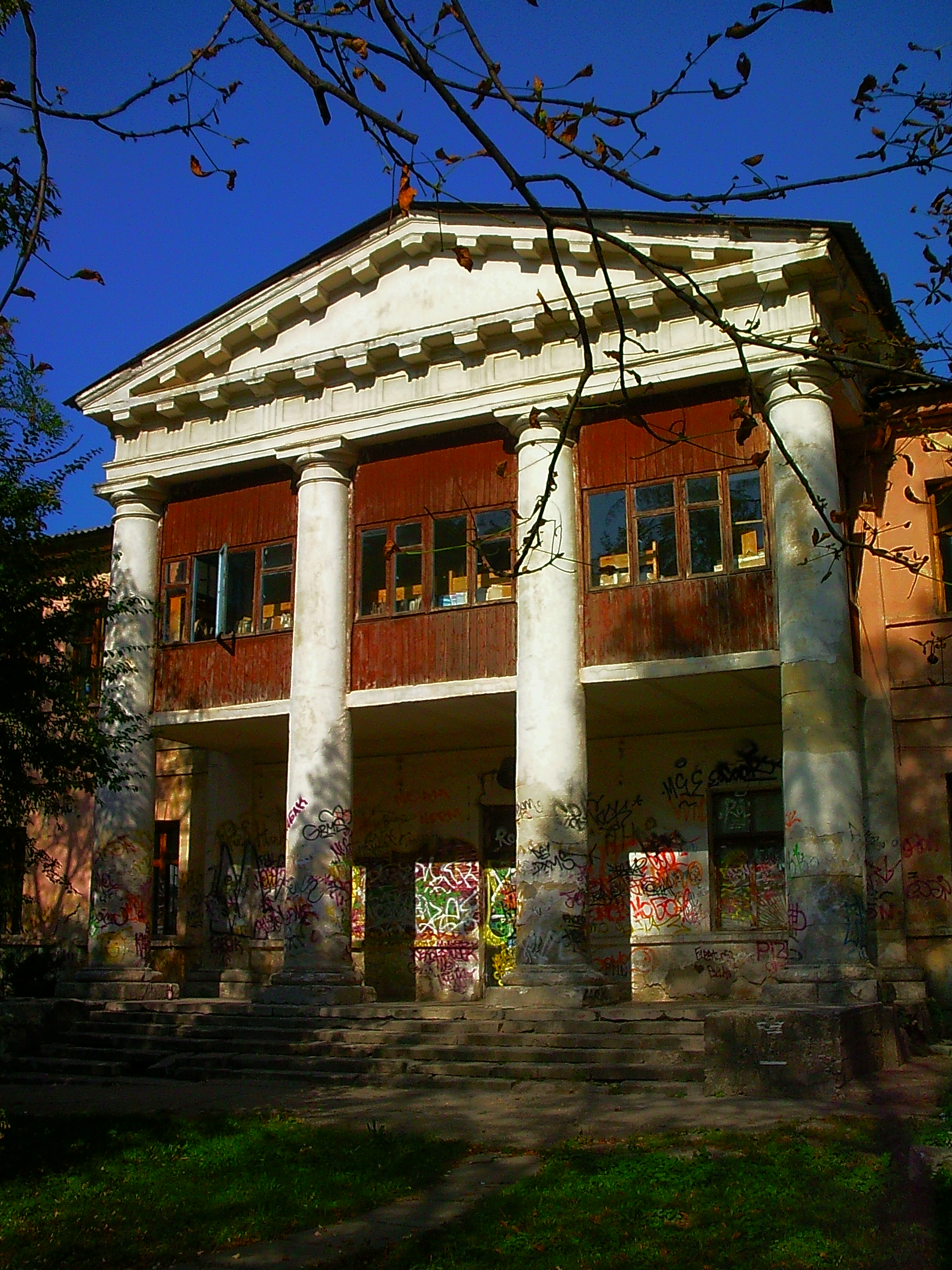 Обратная сторона медали